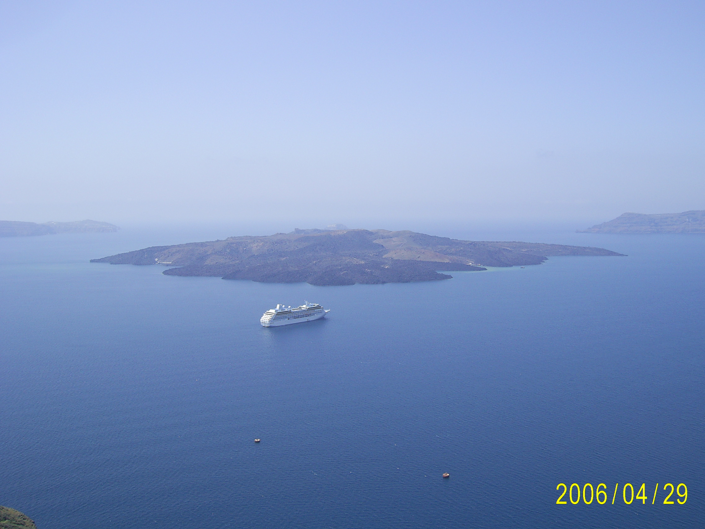 Santorini